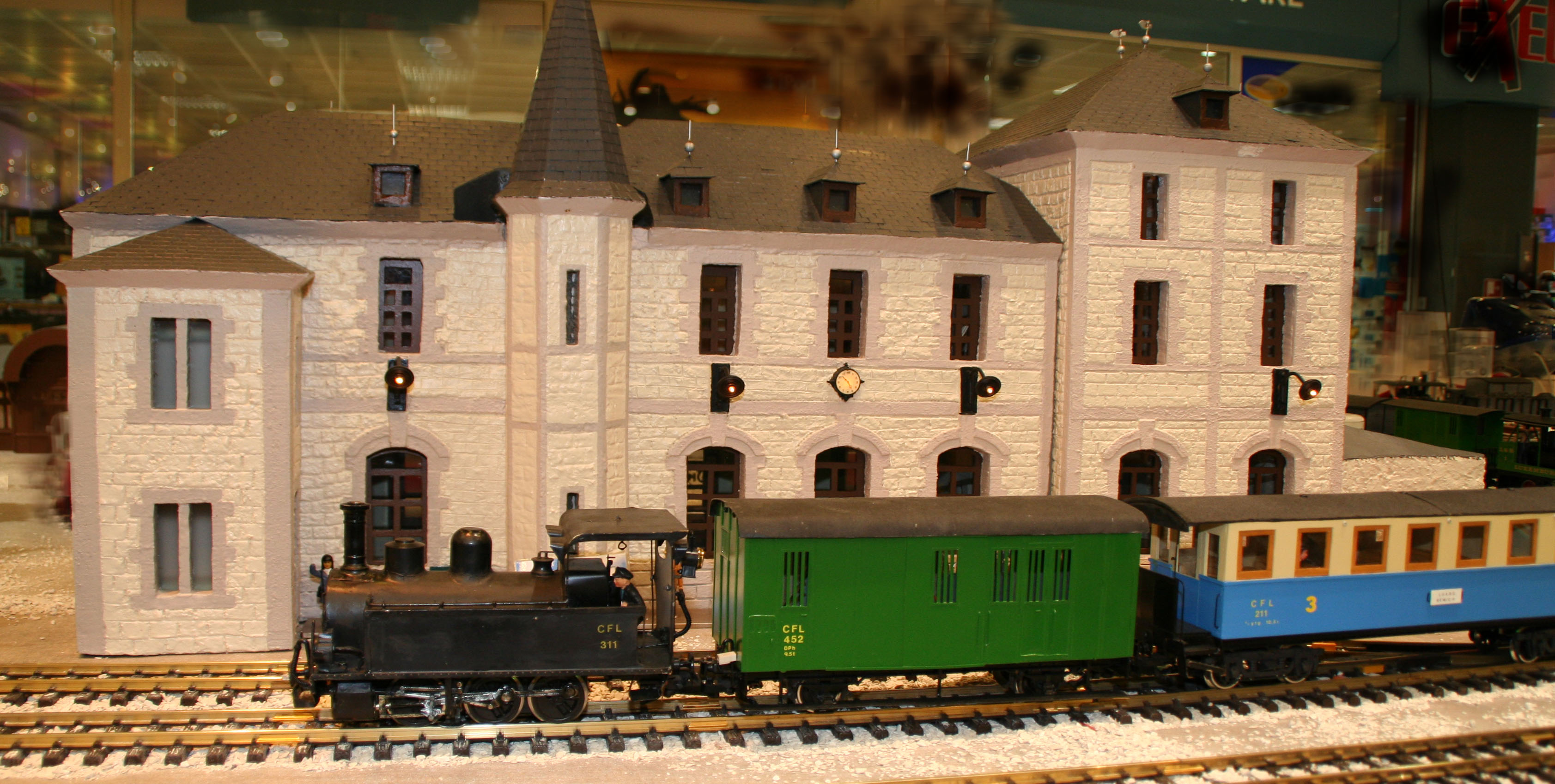 De Chareli virun der Iechternacher Gare (Modell gebaut vum Pierre Müller).